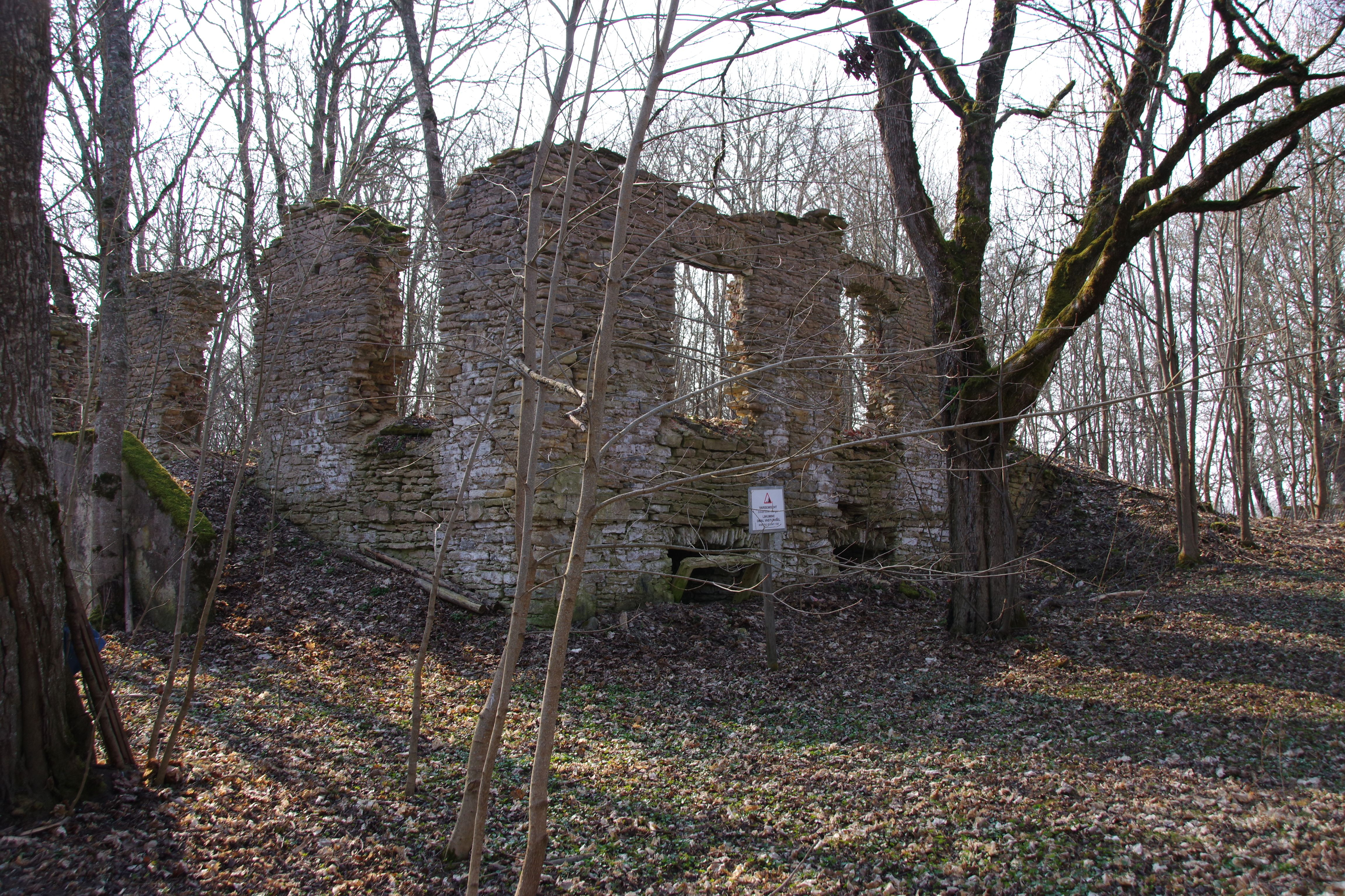 Saastna mõis oli rüütlimõis Karuse kihelkonnas Läänemaal.